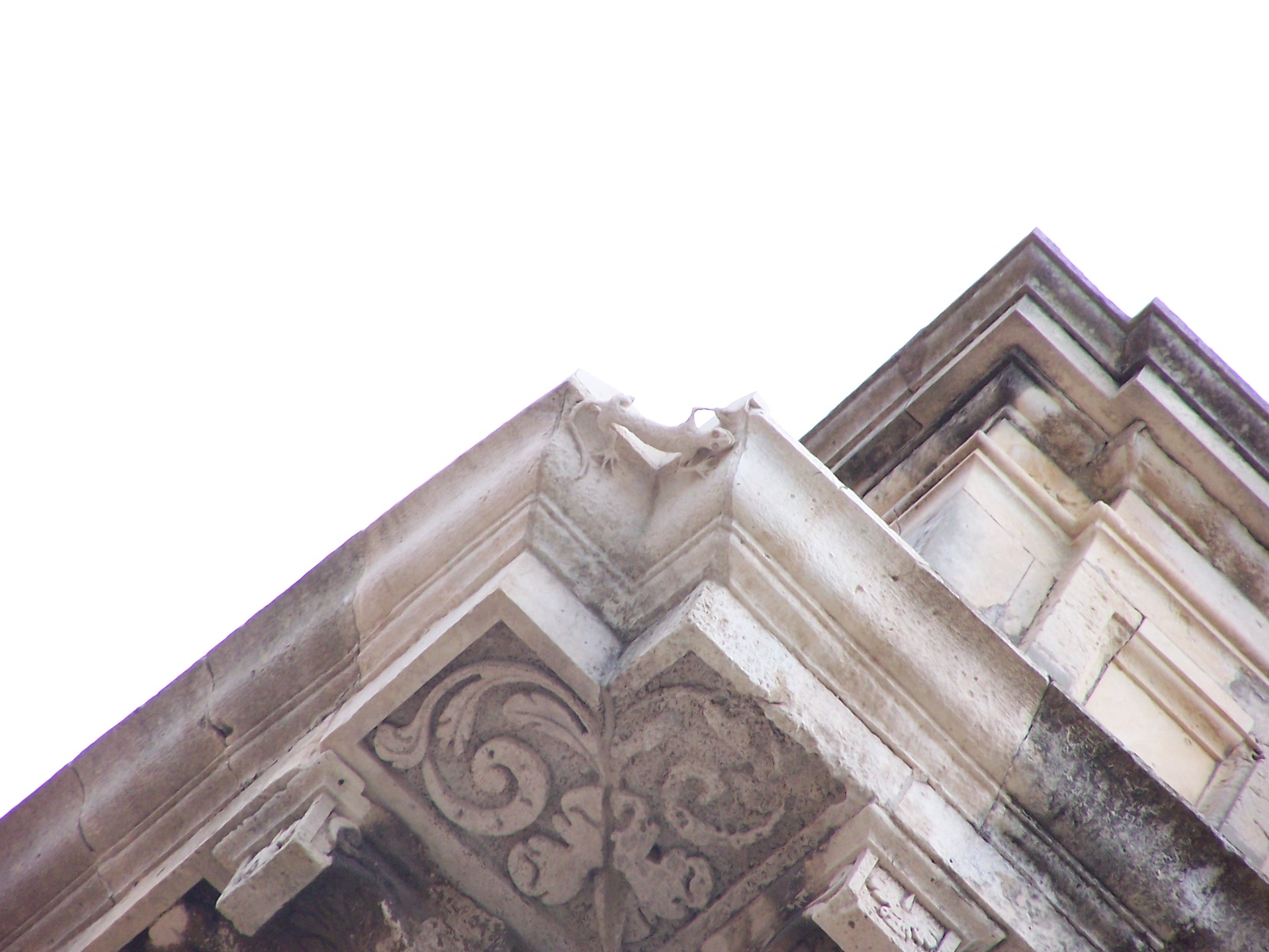 La lucertola del Palazzo Vermexio a Siracusa, simbolo della famiglia dell'architetto.